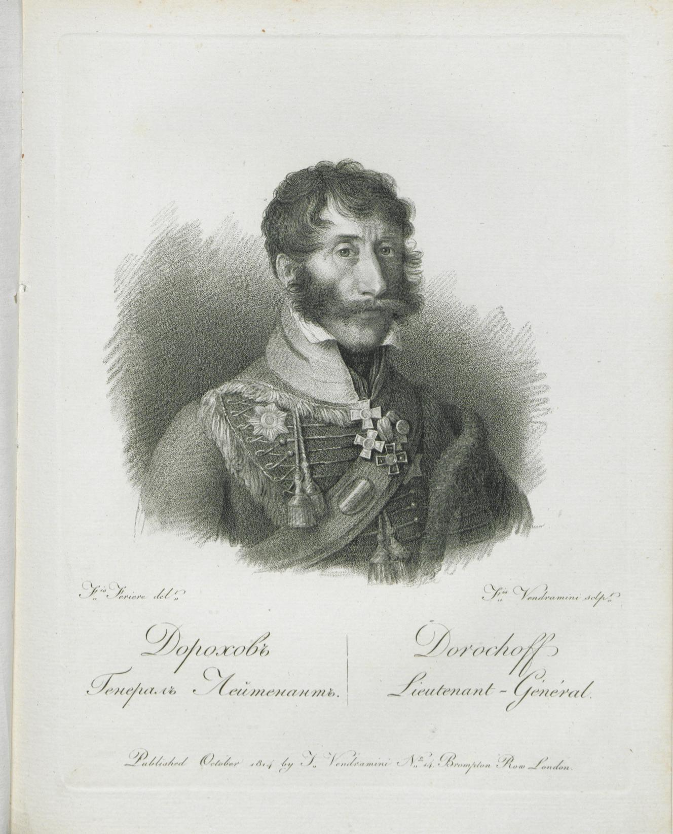 Дорохов, генерал-лейтенат